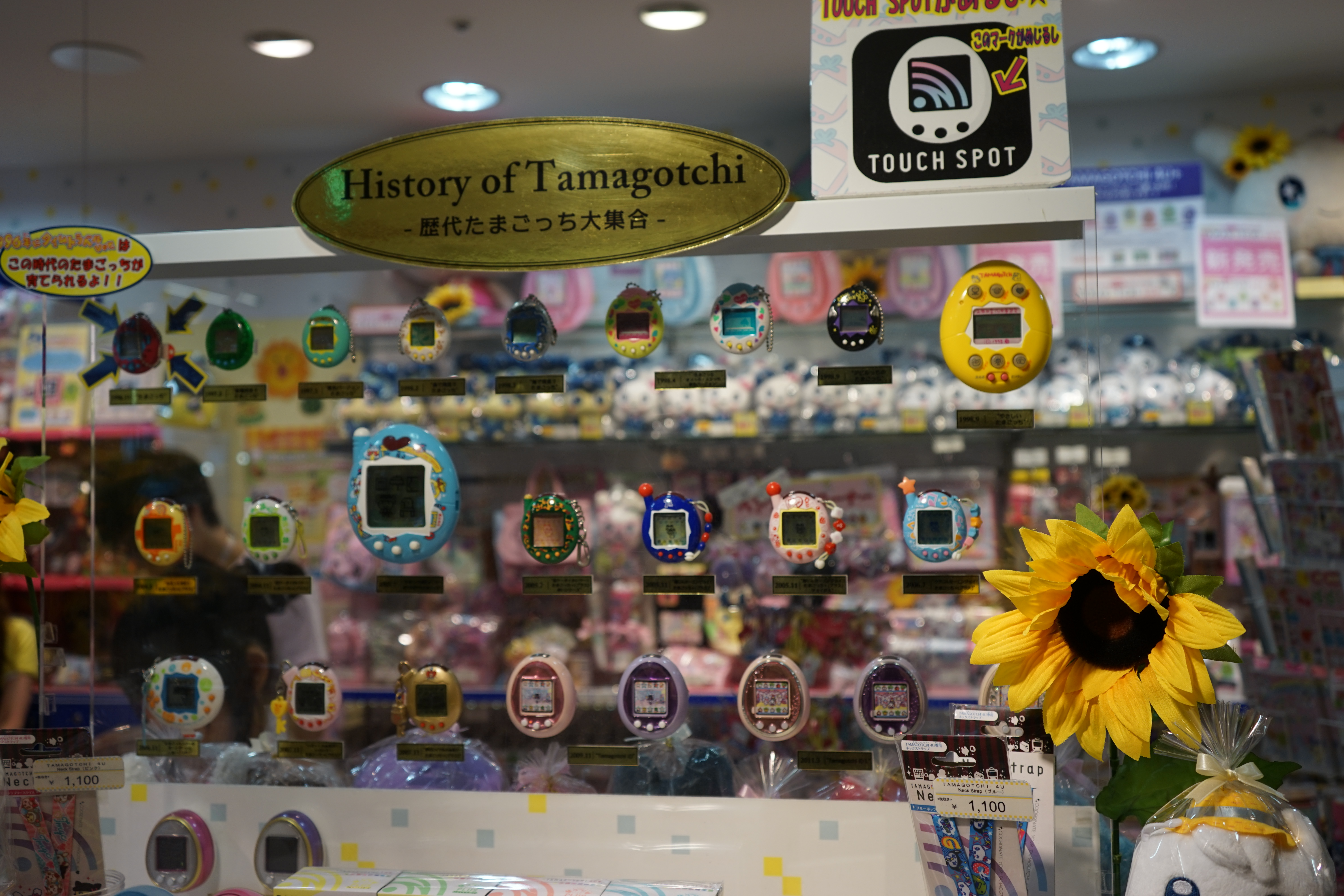 Historía del Tamagotchi